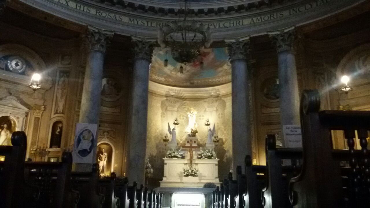 Fotografia interior Iglesia inmaculada, vista del atrio en la mañana. Año 2016